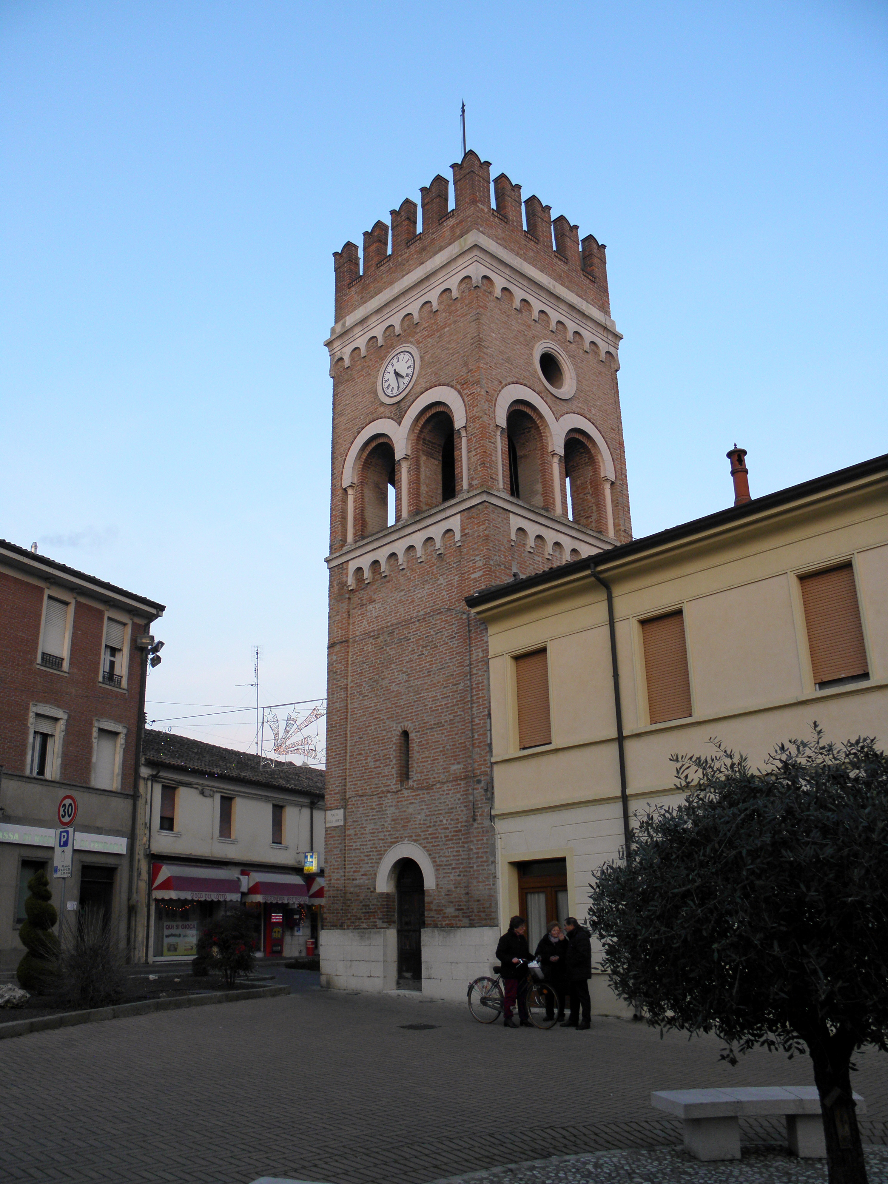 Migliarino, frazione di Fiscaglia e già comune autonomo: la torre campanaria.